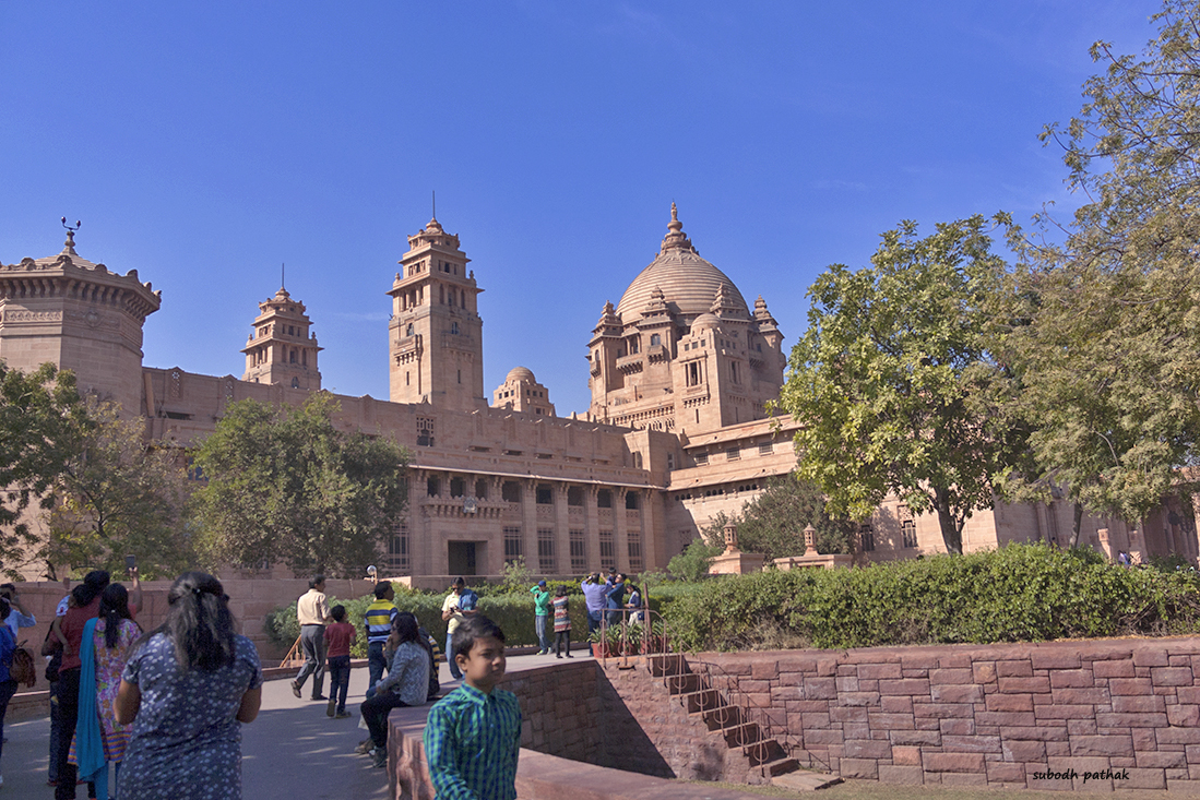 उमेद भवन हा राजवाडा आधुनिक काळातील असून इथे राजघराण्यातील सध्याच्या सदस्यांचे निवास स्थान , एक संग्रहालय तसेच एक पंचतारांकित हॉटेल आहे .